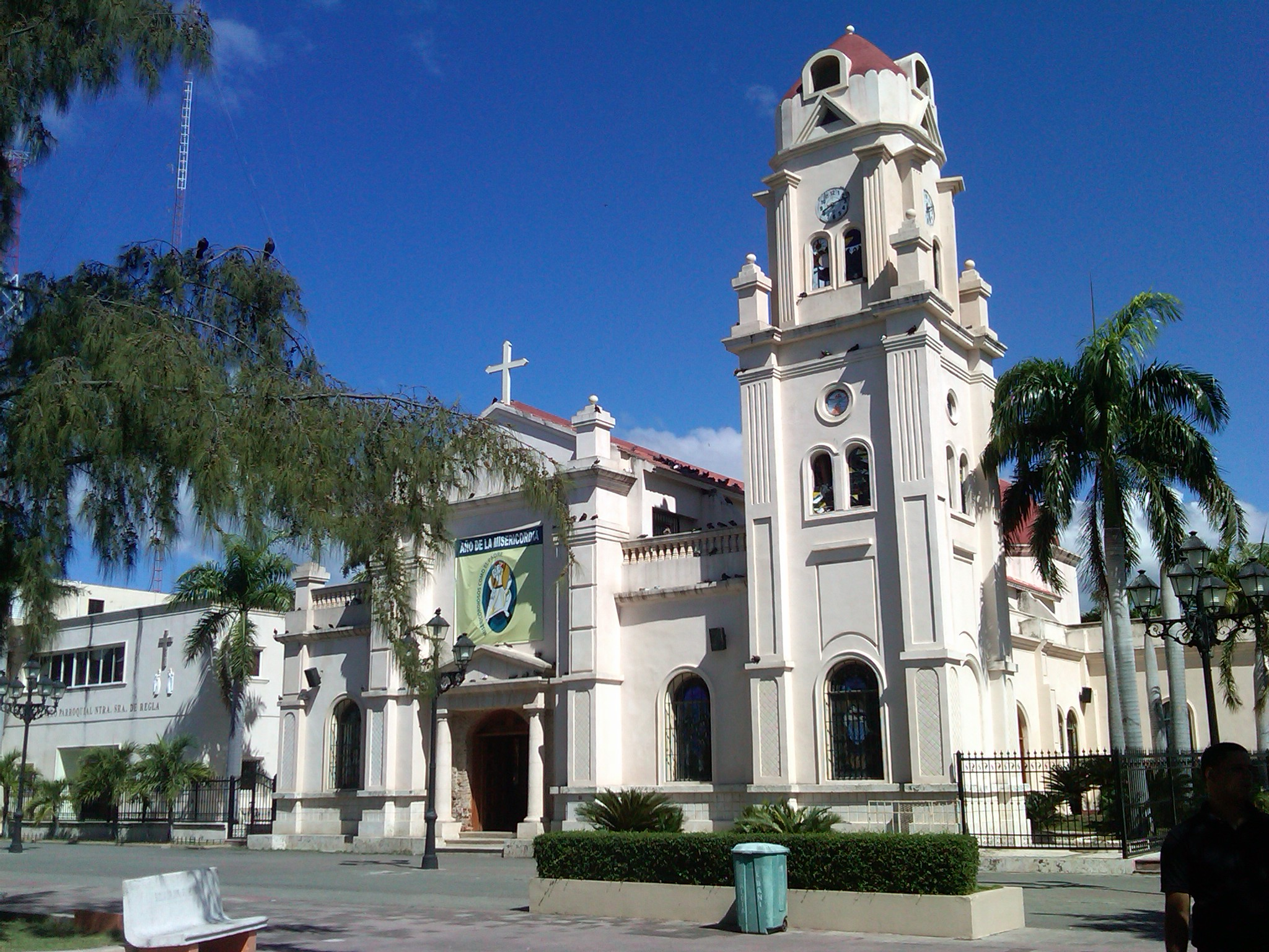 Catedral Nuestra Señora de Regla